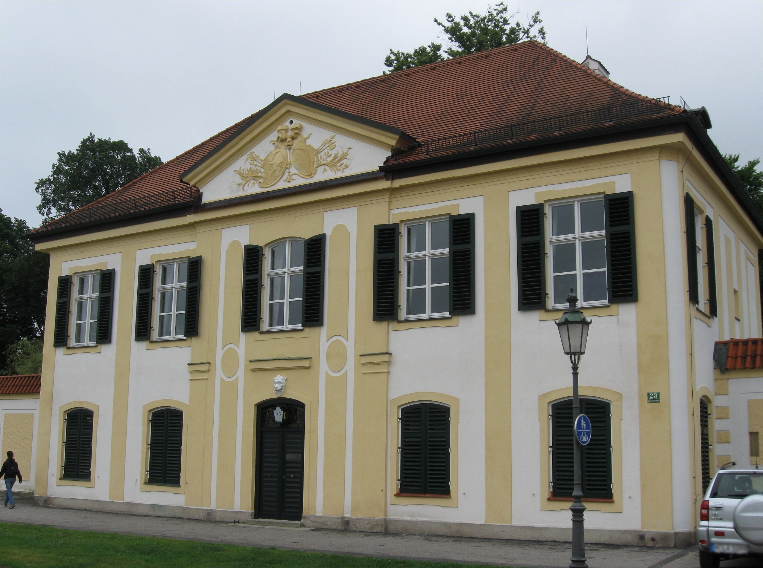 Südliches Schloßrondell 23; Rondellpavillon, jetzt Carl-Friedrich-von-Siemens-Stiftung, zweigeschossiger barocker Walmdachbau mit Stuckgliederung und schmalem Mittelrisalit mit Stuckdekor im Giebelfeld, von Joseph Effner, 1729; beidseitig Rondellmauer, mit barocker Putzgliederung, bauzeitlich.